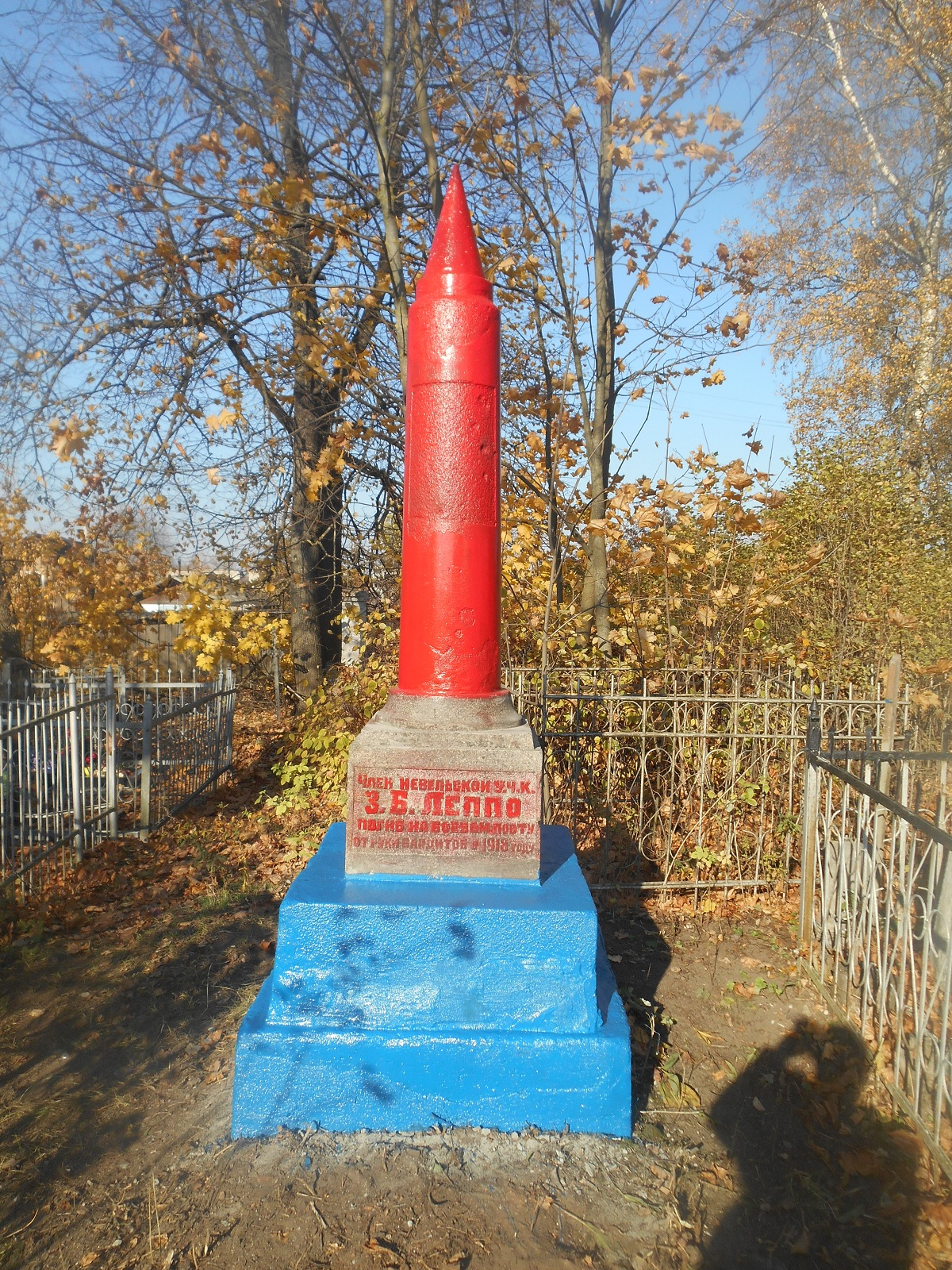 Leppo Z.B Denkmal in Nevel